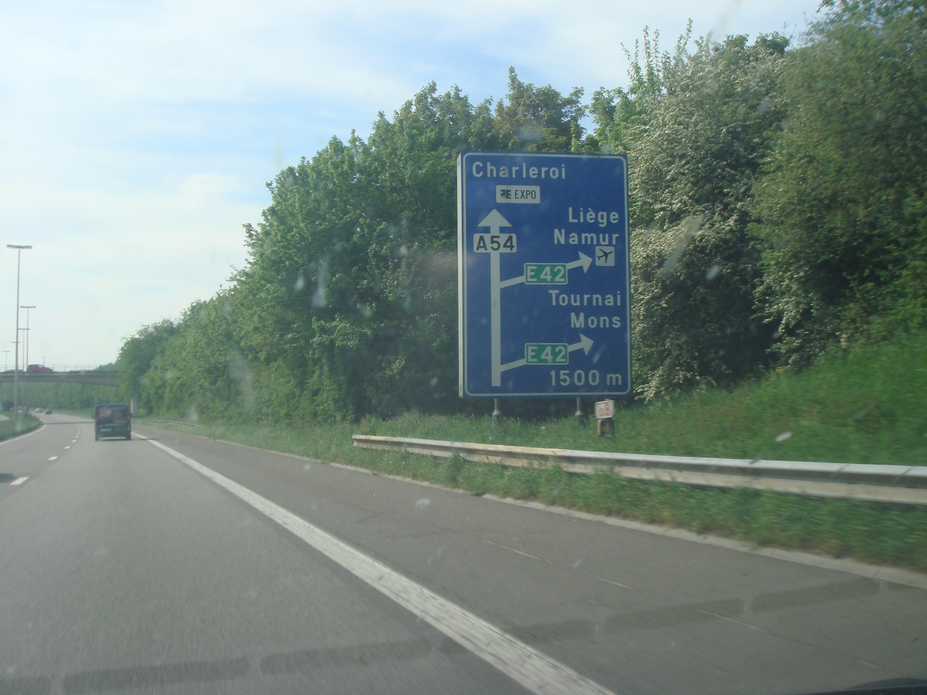 Autoroute E420/A54 près de Charleroi en Belgique